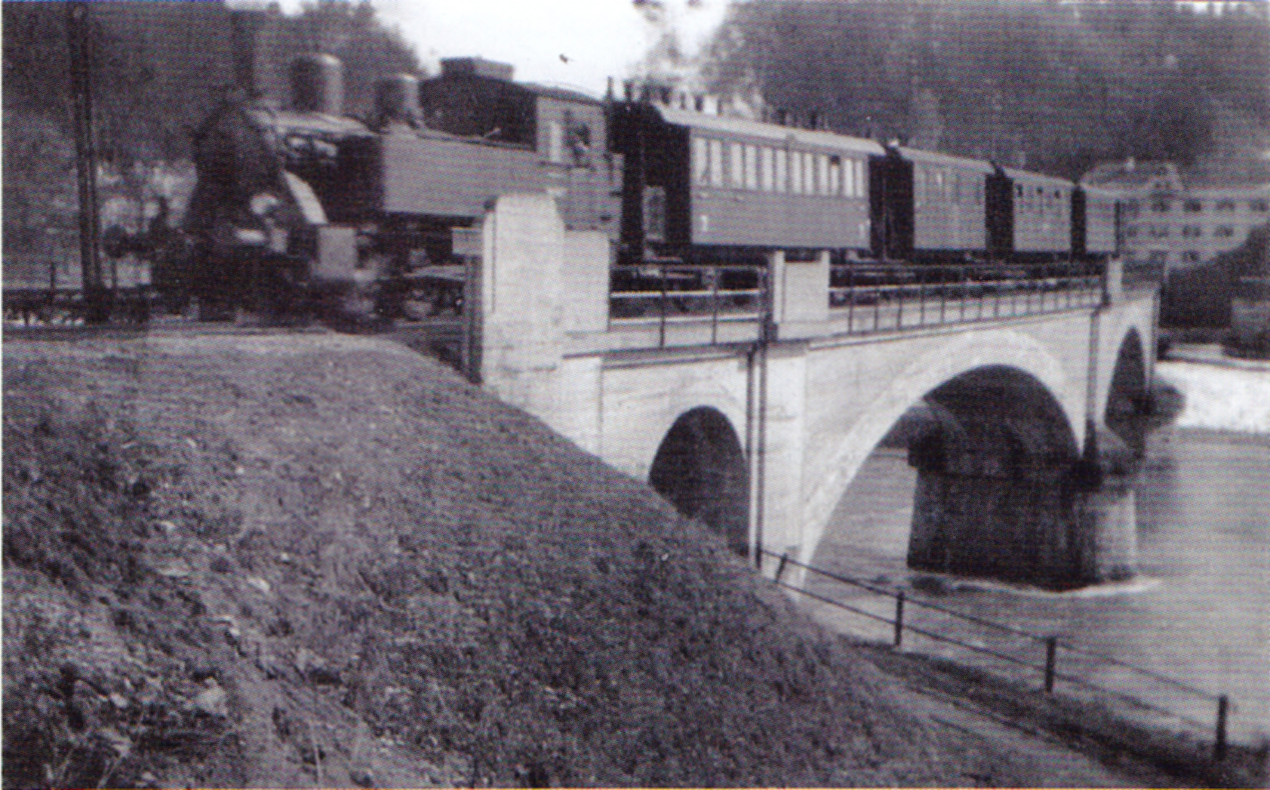 Einer der ersten Züge auf der Bahnstrecke Schongau–Peißenberg überquert die Eisenbahnbrücke über den Lech in Schongau